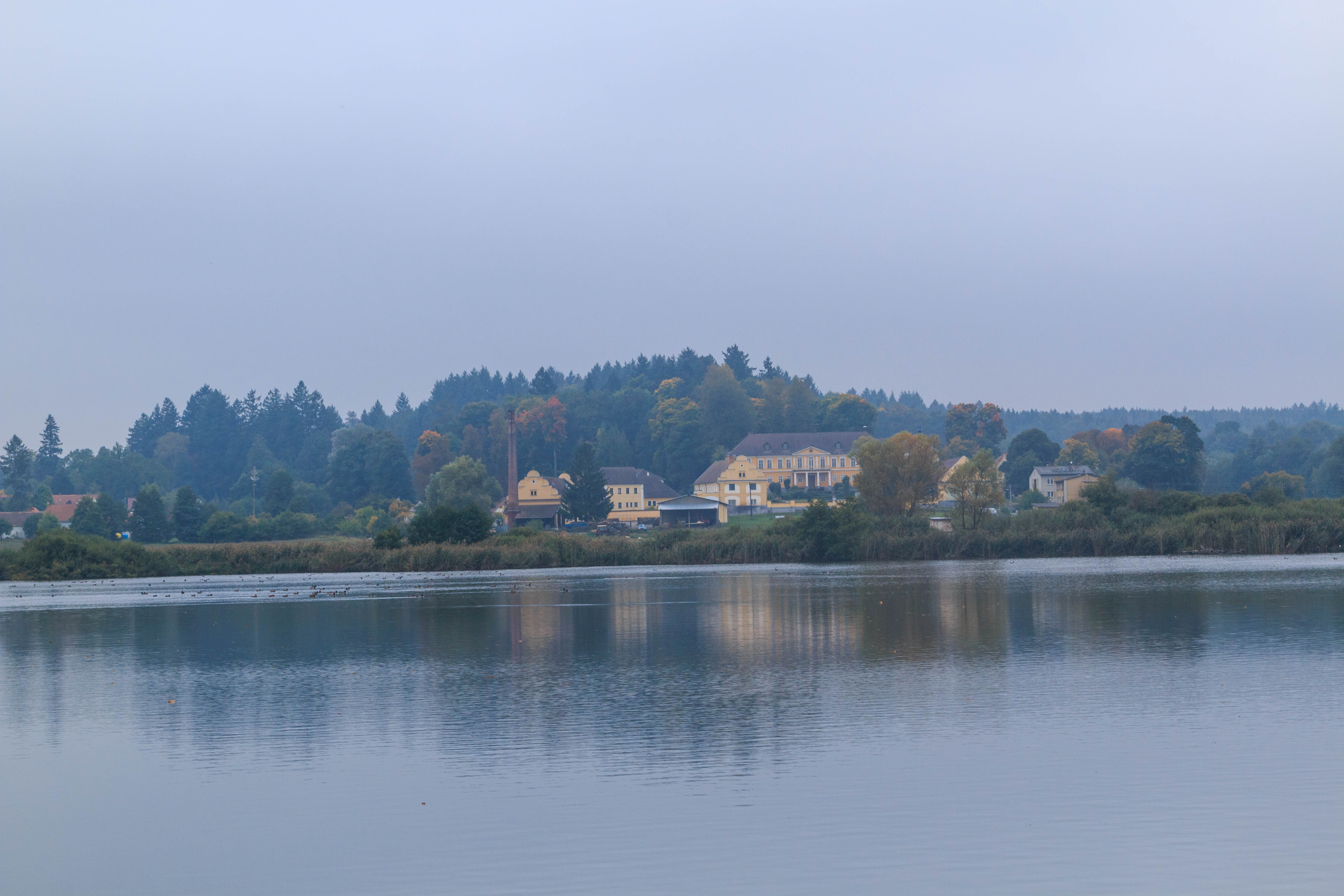 Rybník Ovčín u Čekanic Project: Vodstvo.